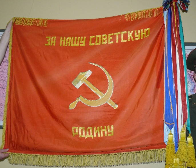 Боевое Знамя. СССР. Реверс. Москва. Центральный музей Вооружённых Сил. Знамённый фонд.